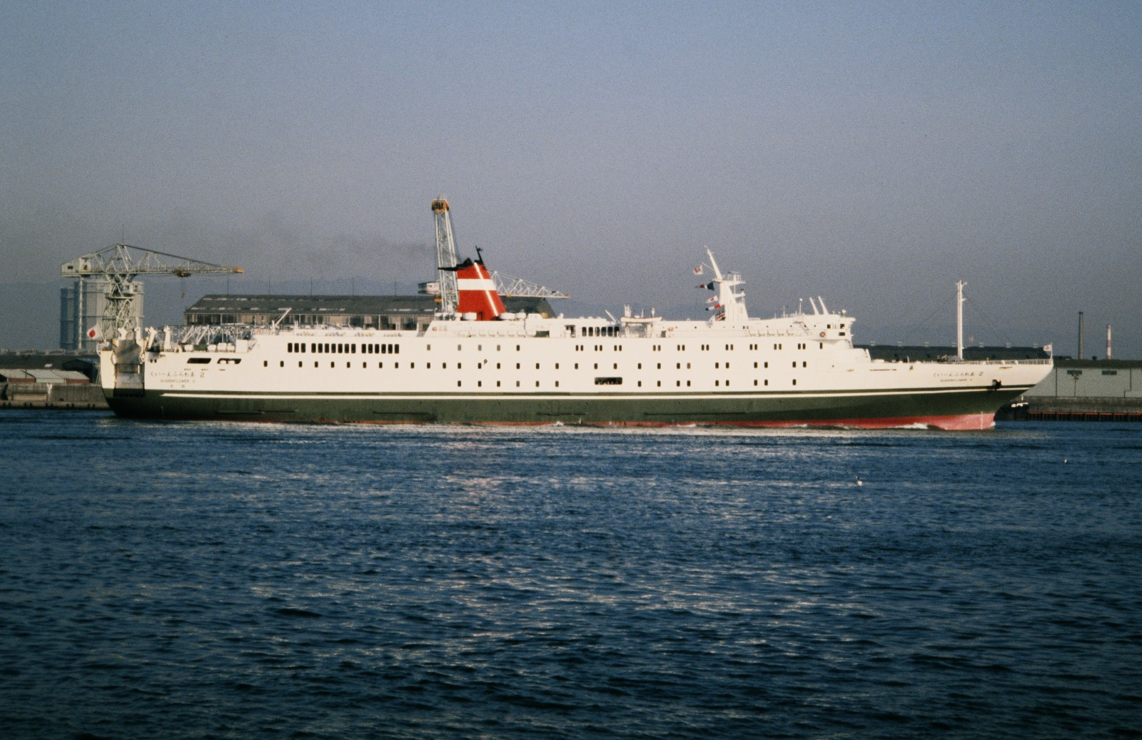 安治川を弁天埠頭へ向かって航行する、関西汽船別府航路・今治松山寄港便のくいーんふらわあ2